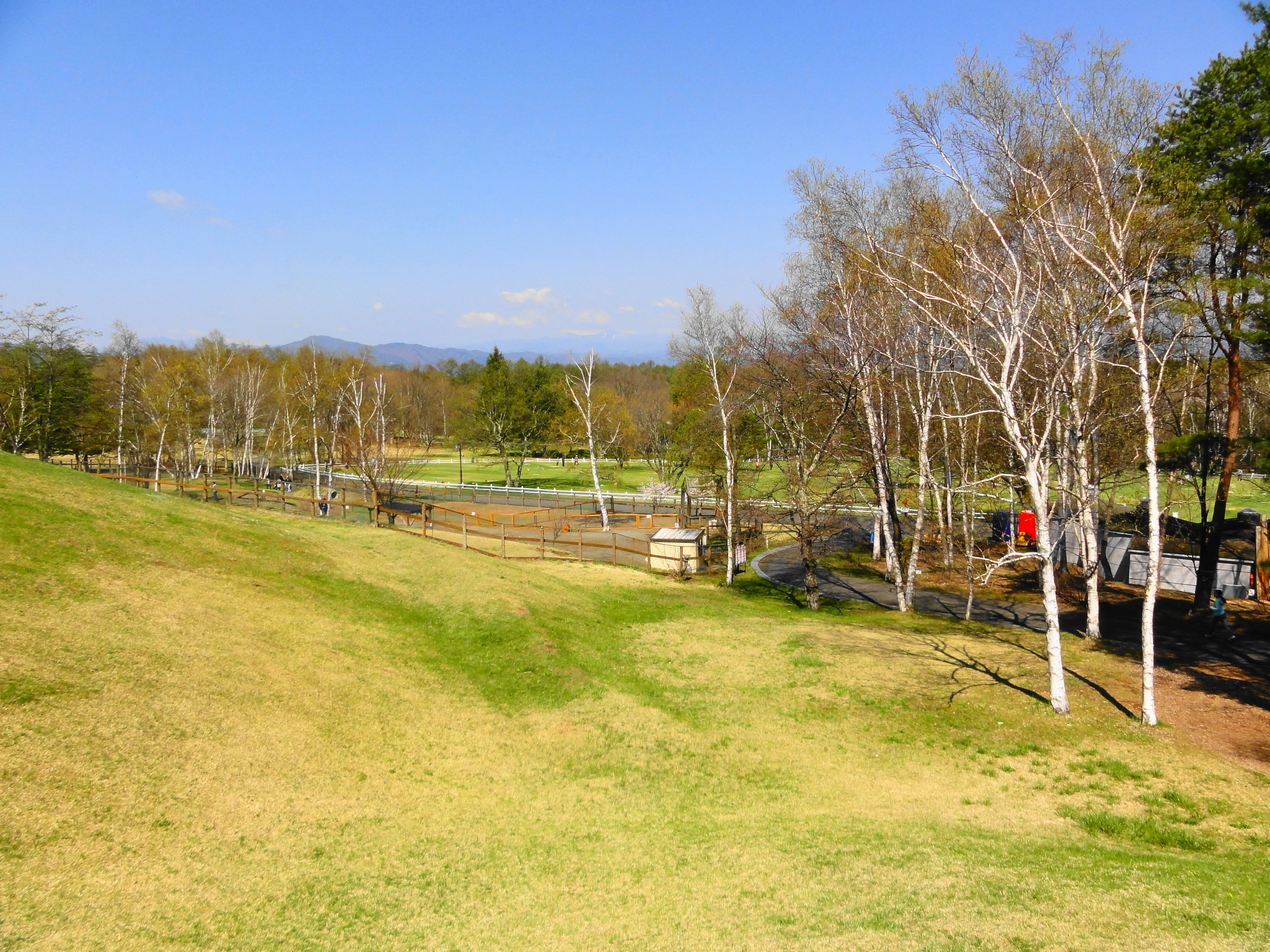 原村自然文化園